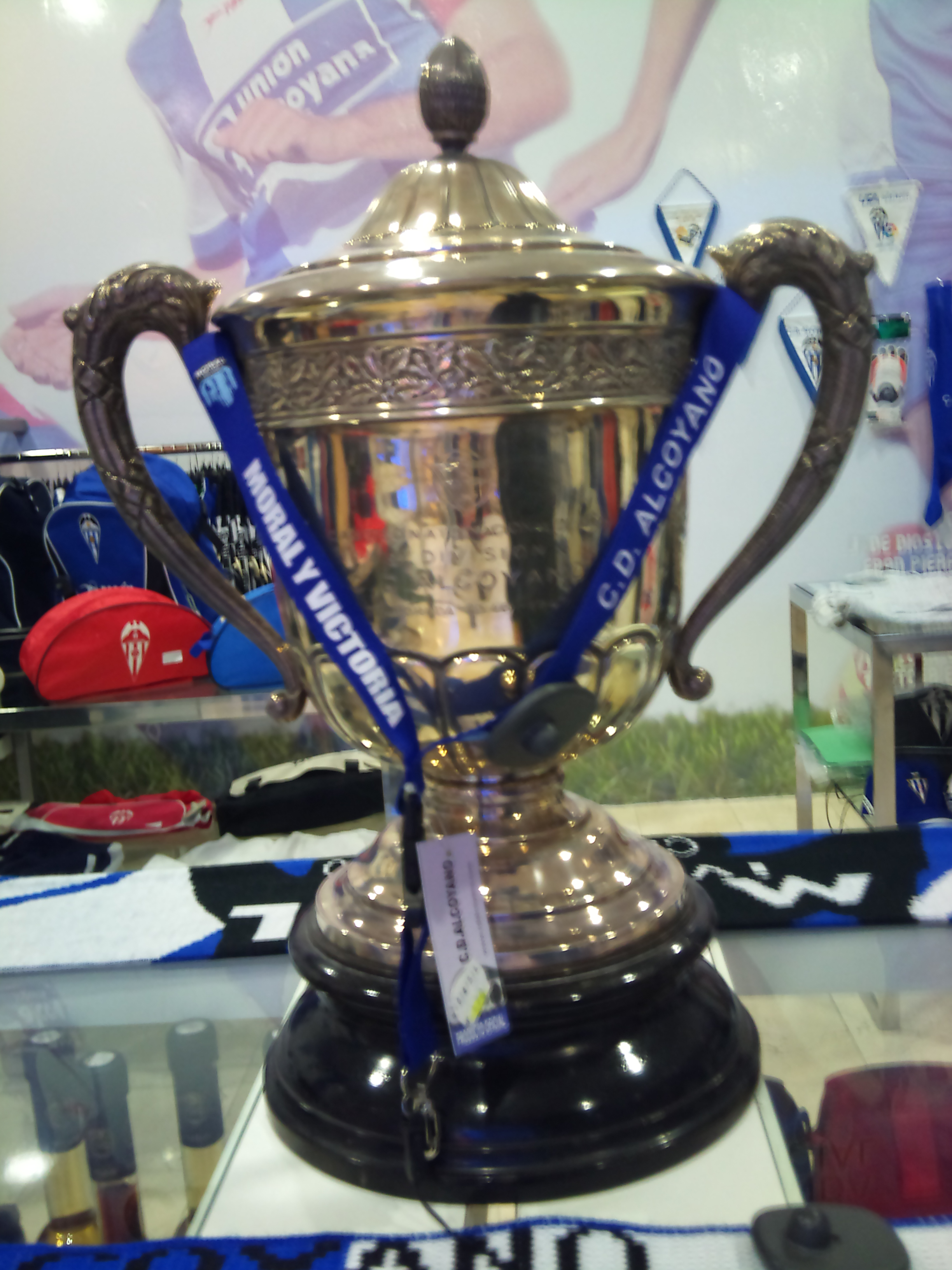 Guanyada pel Deportivo Alcoiano